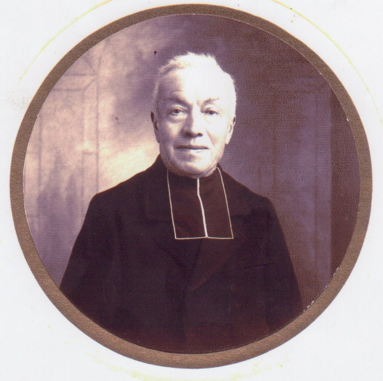 Abbé Eugène Vatel, Curé de Noirterre de 1902 à 1935